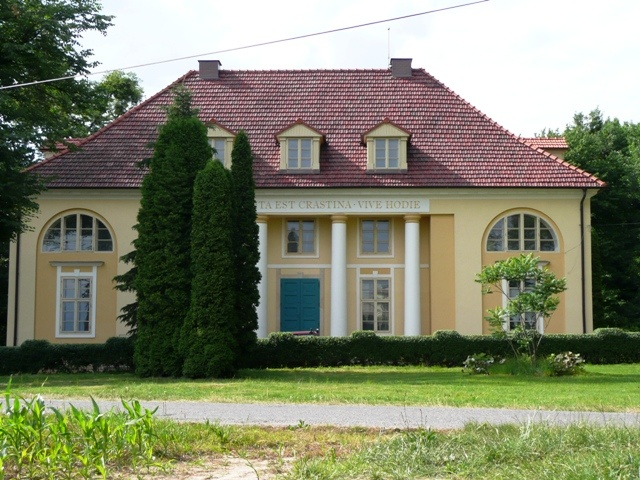 Bażantarnia w Pszczynie